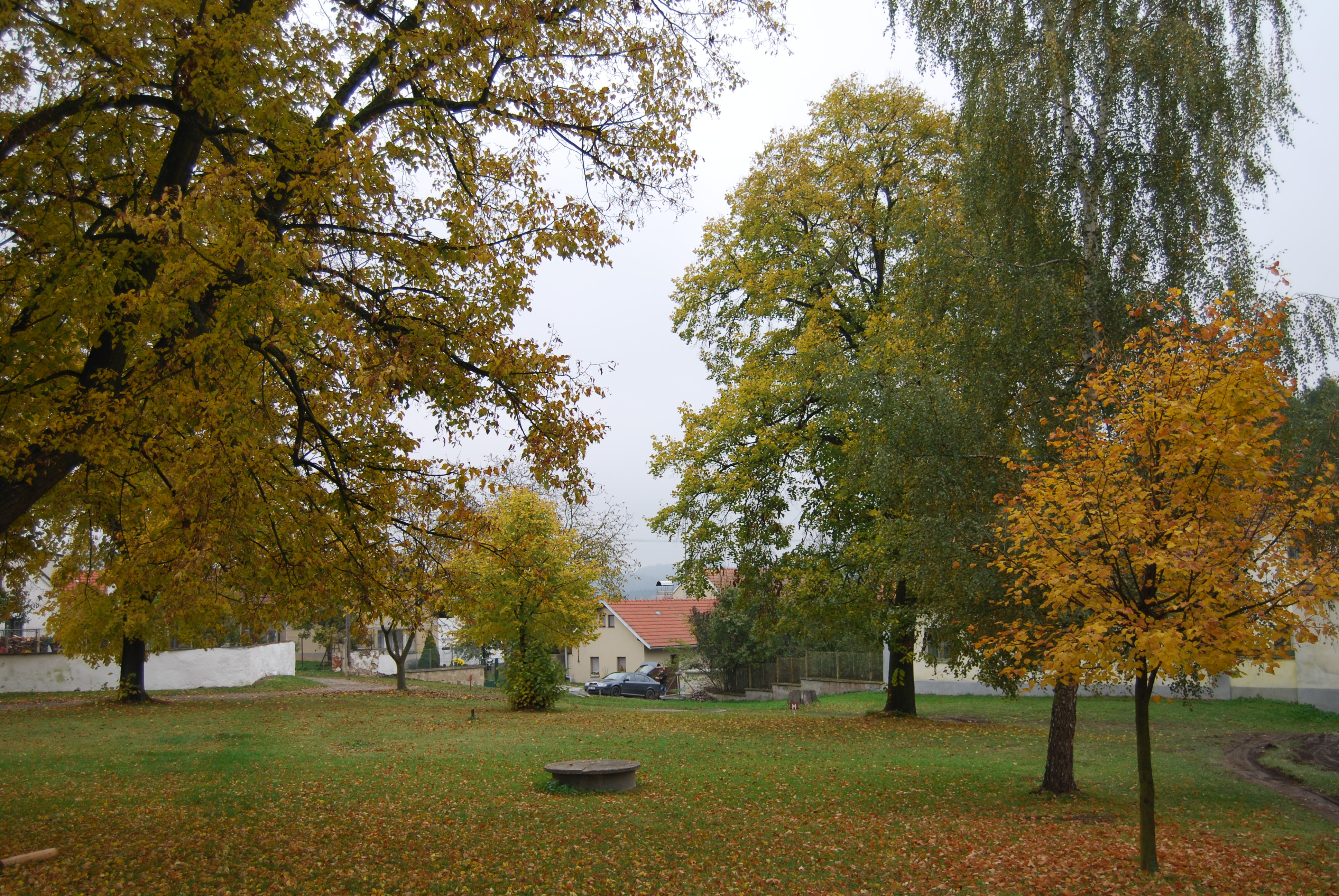 Pohled na část obce. Kosobudy je část obce Klučenice v okrese Příbram. Česká republika.